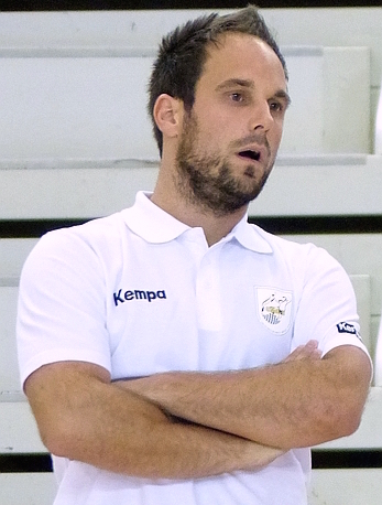 Emmanuel Mayonnade entraîneur de l'équipe de handball de Mios Biganos Bègles . Le 14 septembre 2014, lors du match Issy Paris Hand / Mios Biganos Bègles au stade Robert Charpentier à Issy-les-Moulineaux.